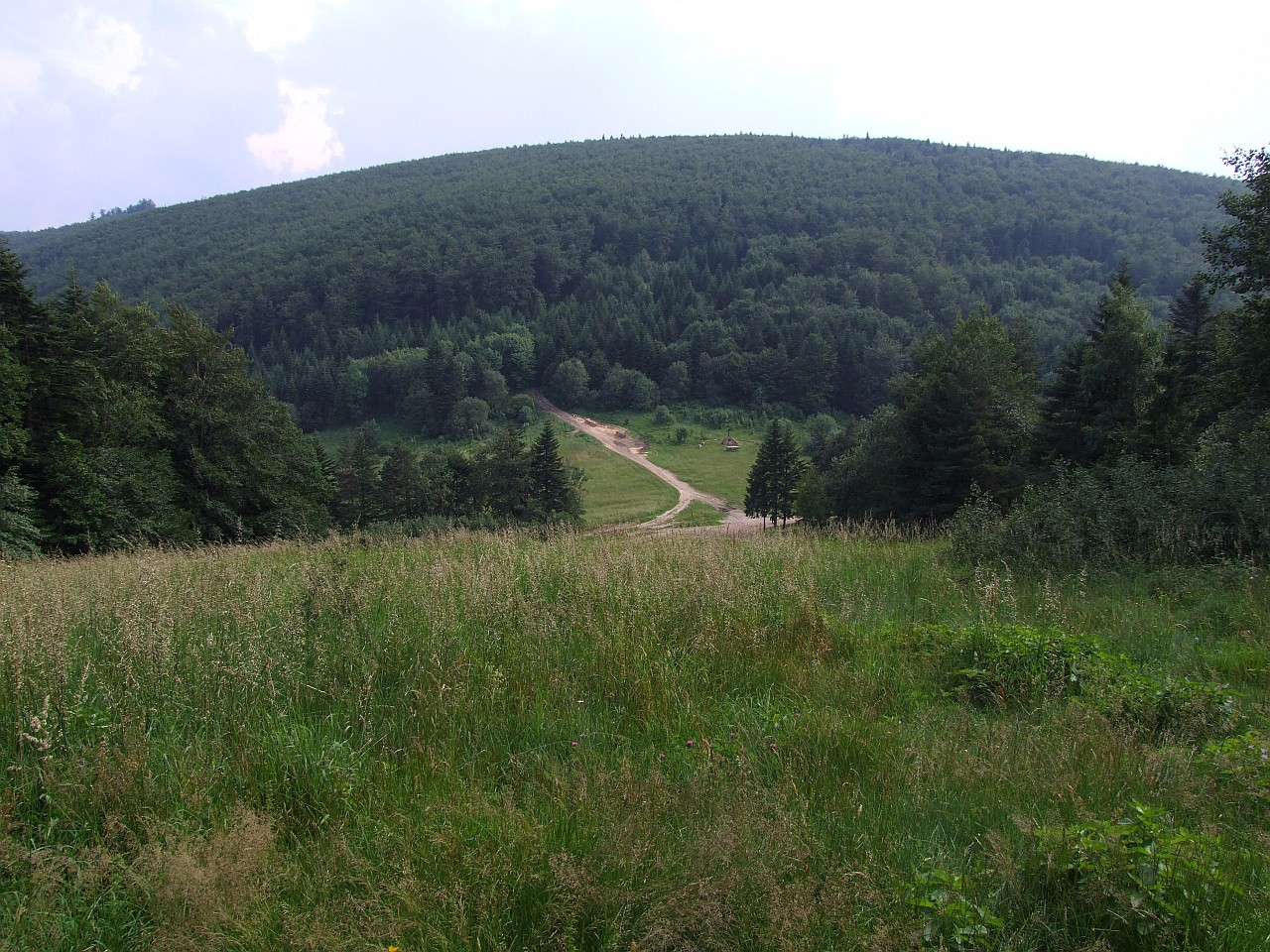 Sucha Przełęcz i Łysina w Beskidzie Makowskim